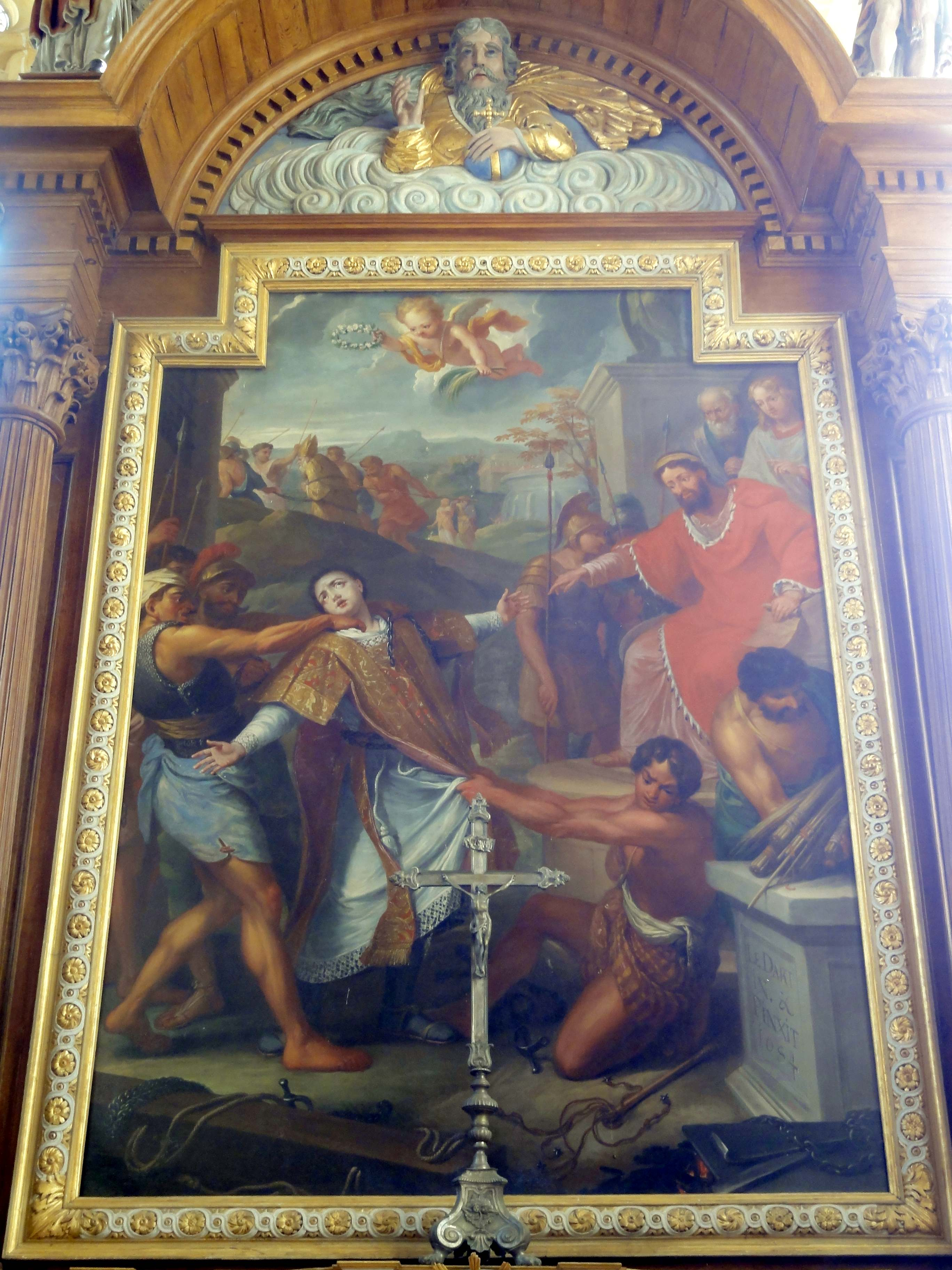 Mobilier de l'église (voir titre).